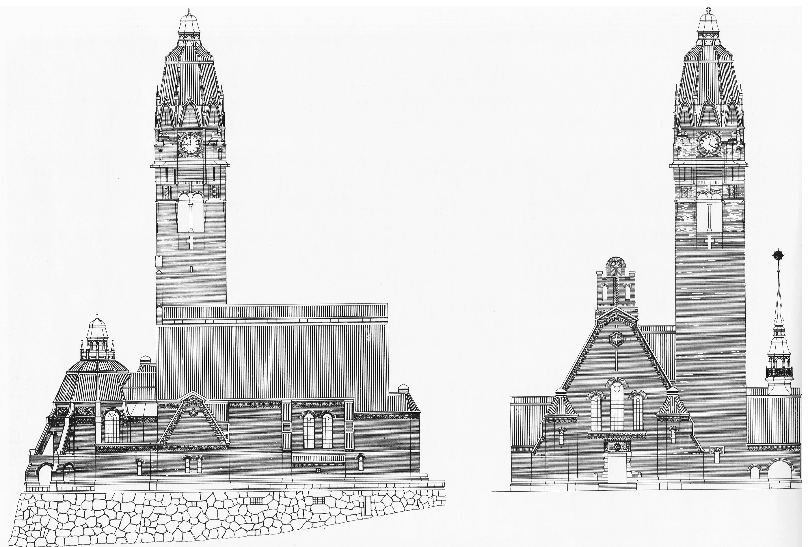 Uppenbarelsekyrkan i Saltsjöbaden, Bobergs fasader.